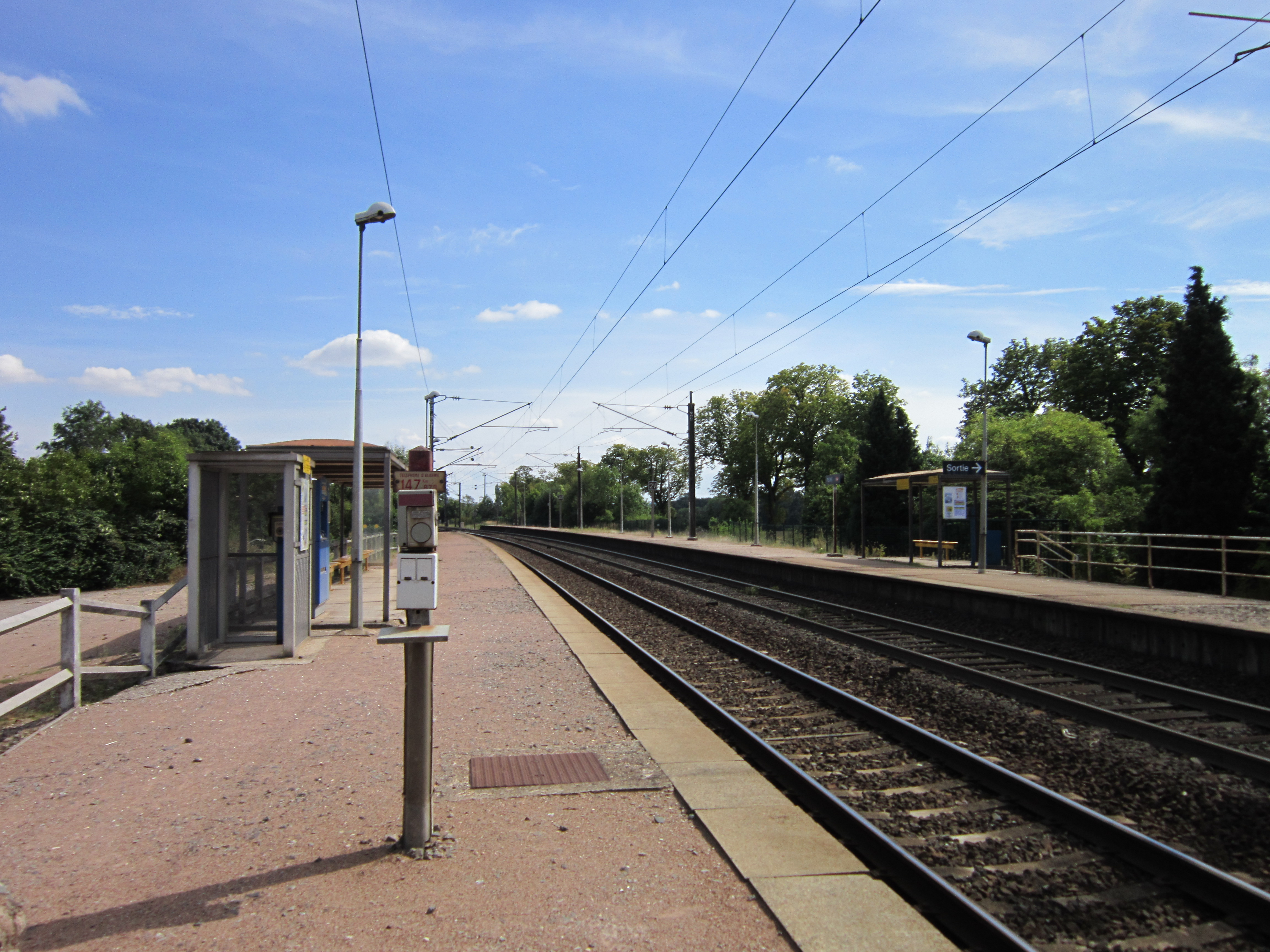 Quais de la halte ferroviaire de Peltre.